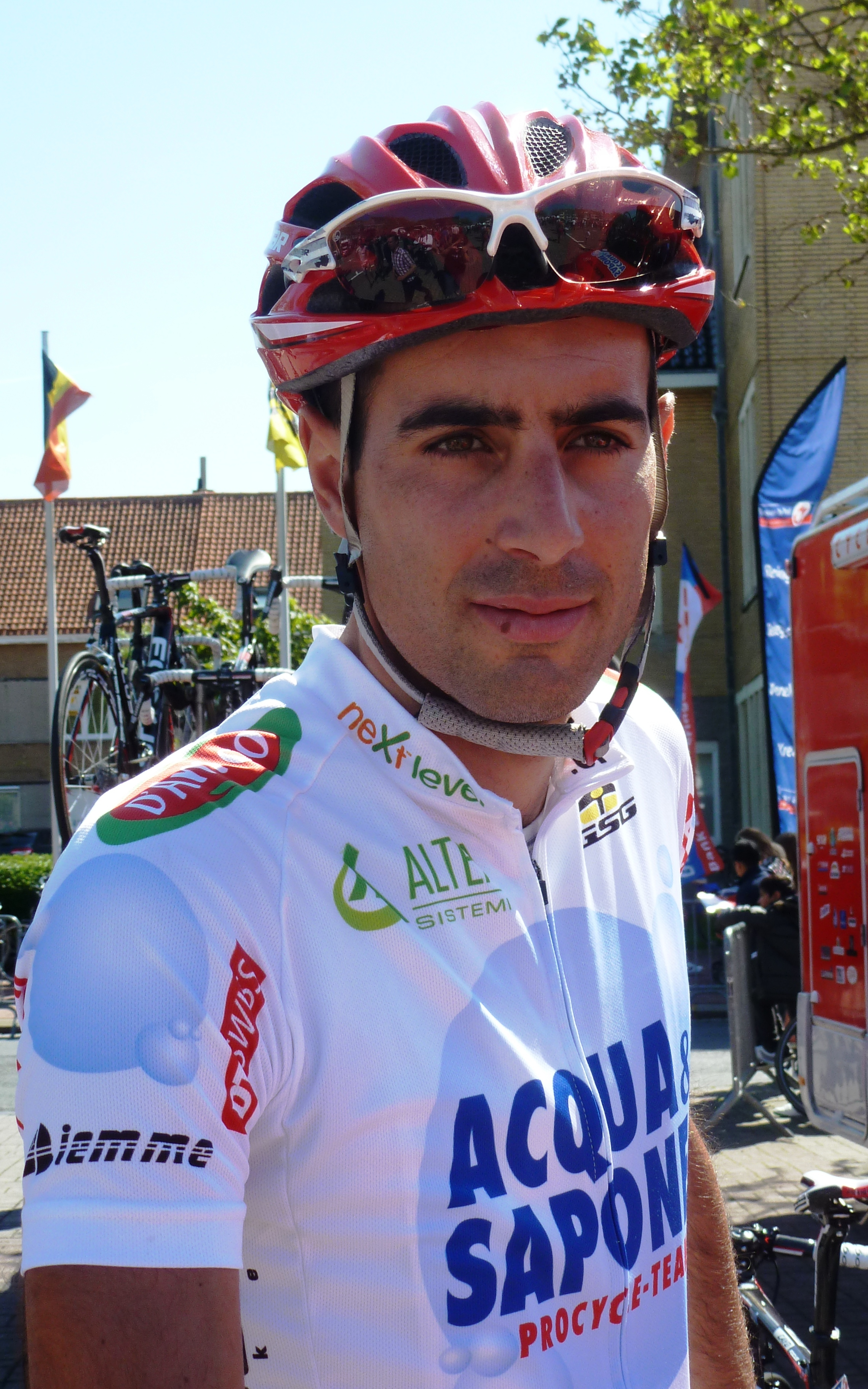 unbekannt